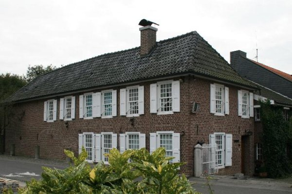 Denkmal Nr. 63 in Schwalmtal-Lüttelforst